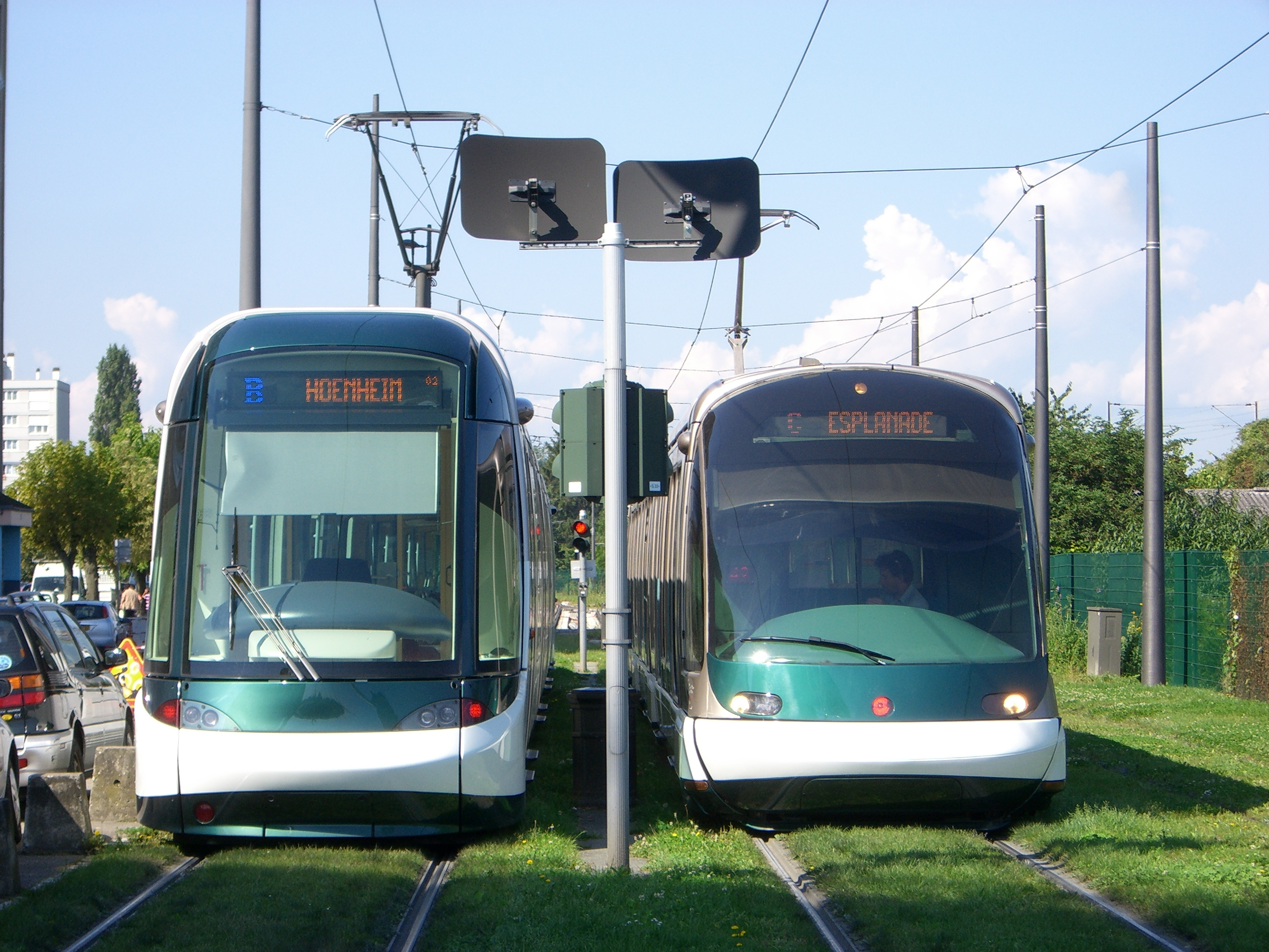 Strasbourg - Straßenbahn - Fahrzeugtypen.jpg